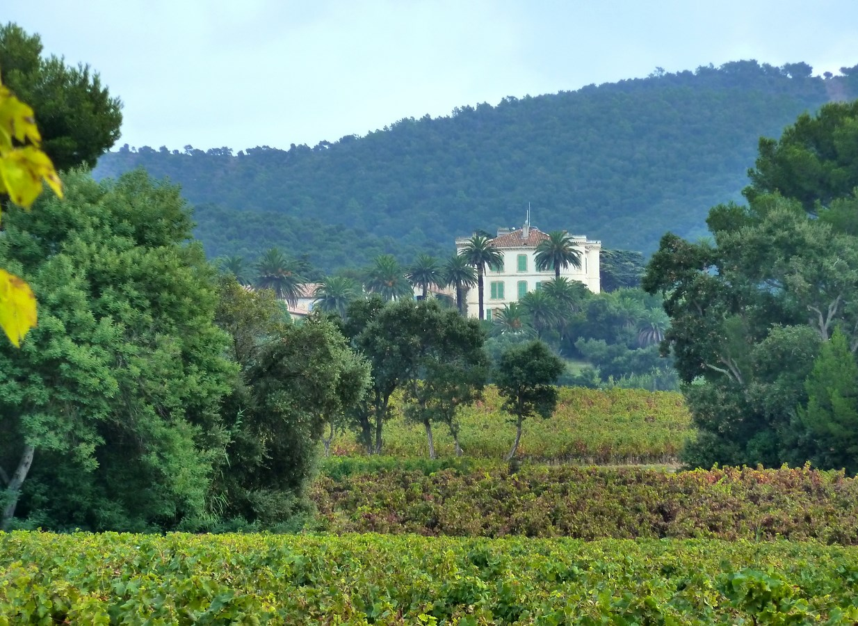 Château de Brégançon commune de Bormes les Mimosas France